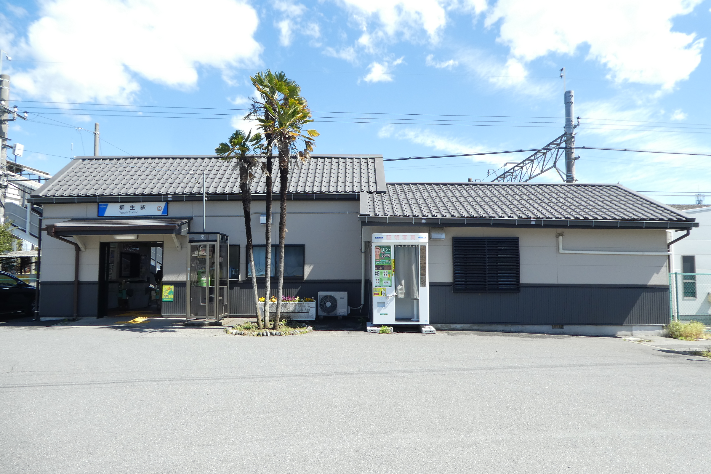 東武鉄道日光線 柳生駅